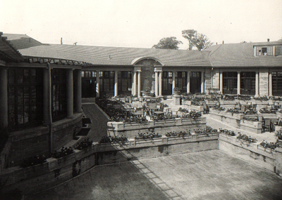 Sunnyside Pavilion Tea Garden